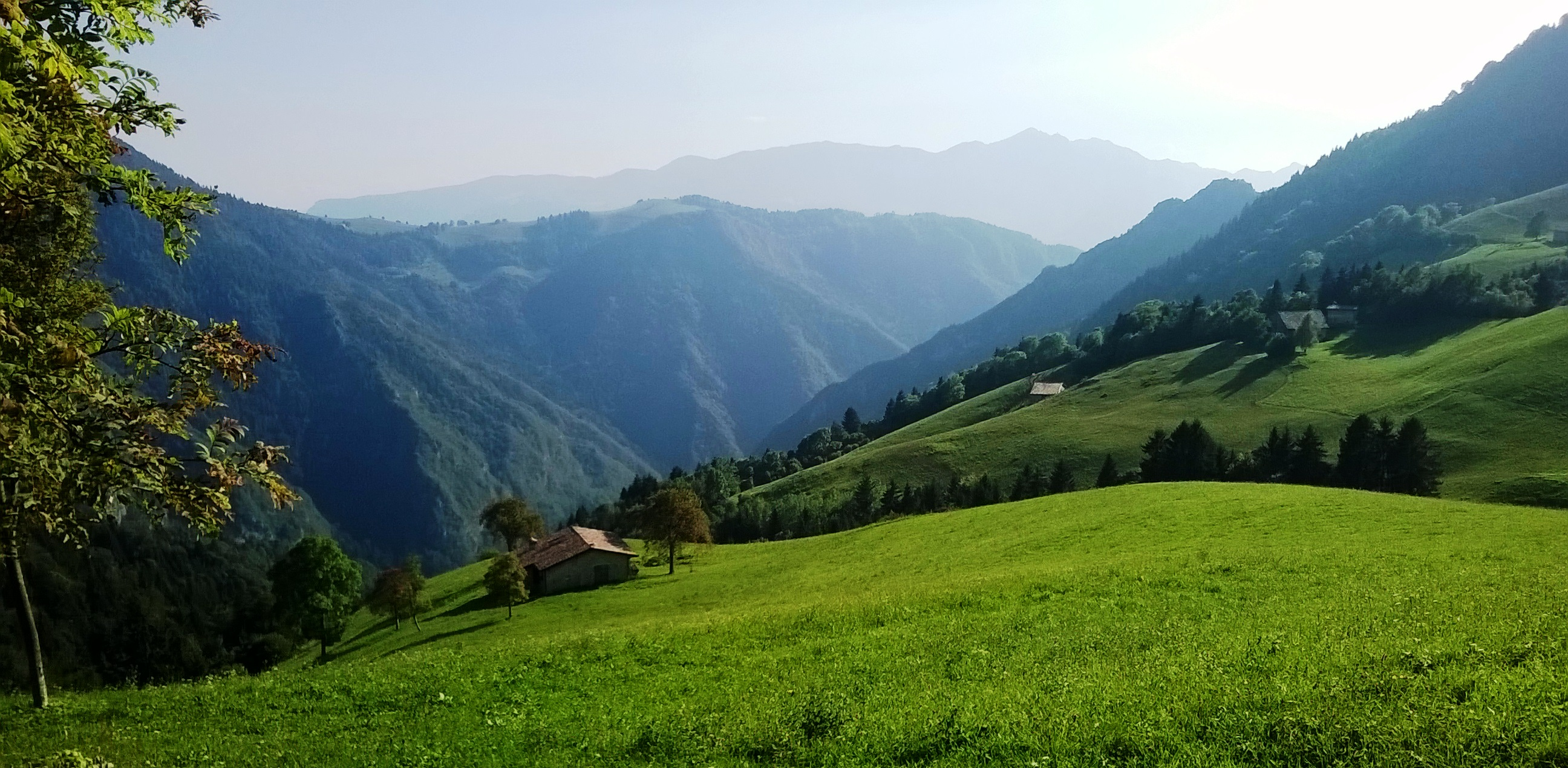 Loc. Colle Palazzo. Oltressenda alta (BG). Italy